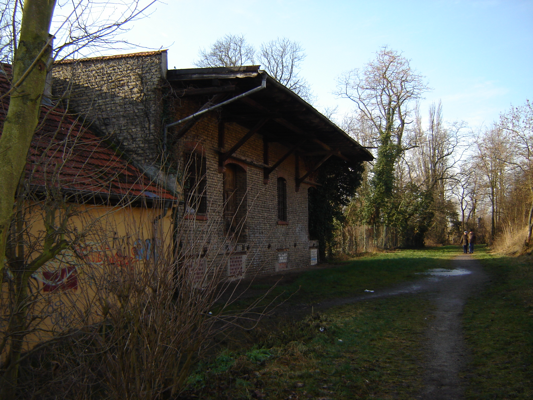 Die ehemalige Bahnverladestation der Steinmühle Osthofen vom Bahnhof kommend gesehn. Die Rampe wurde mit einem abzweigendem Gleis bedient.